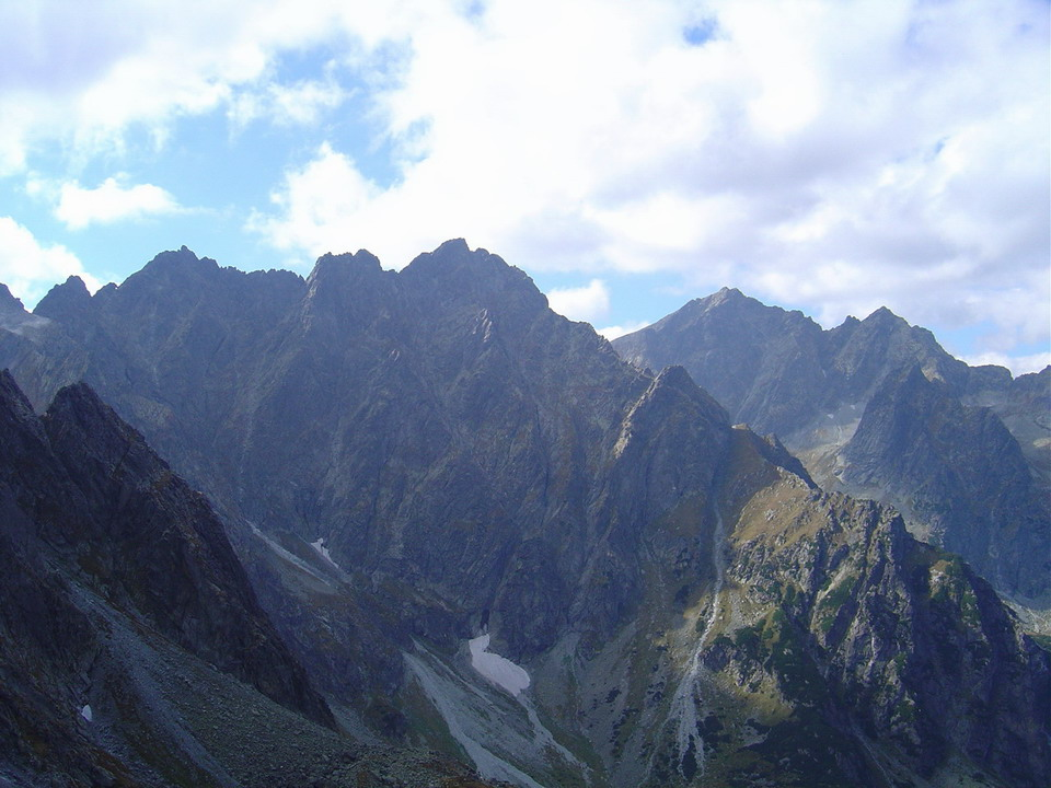 Ganok and Kvetnicova veza from Litvorova dolina